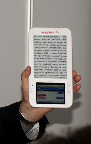 Highscreen Alex - ридер на Android с двумя дисплеями